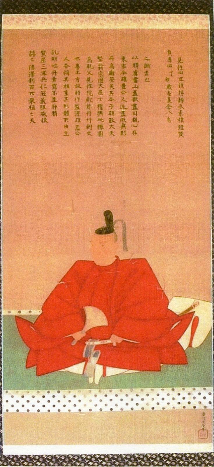 伊勢菰野藩初代藩主・土方雄氏の肖像画。